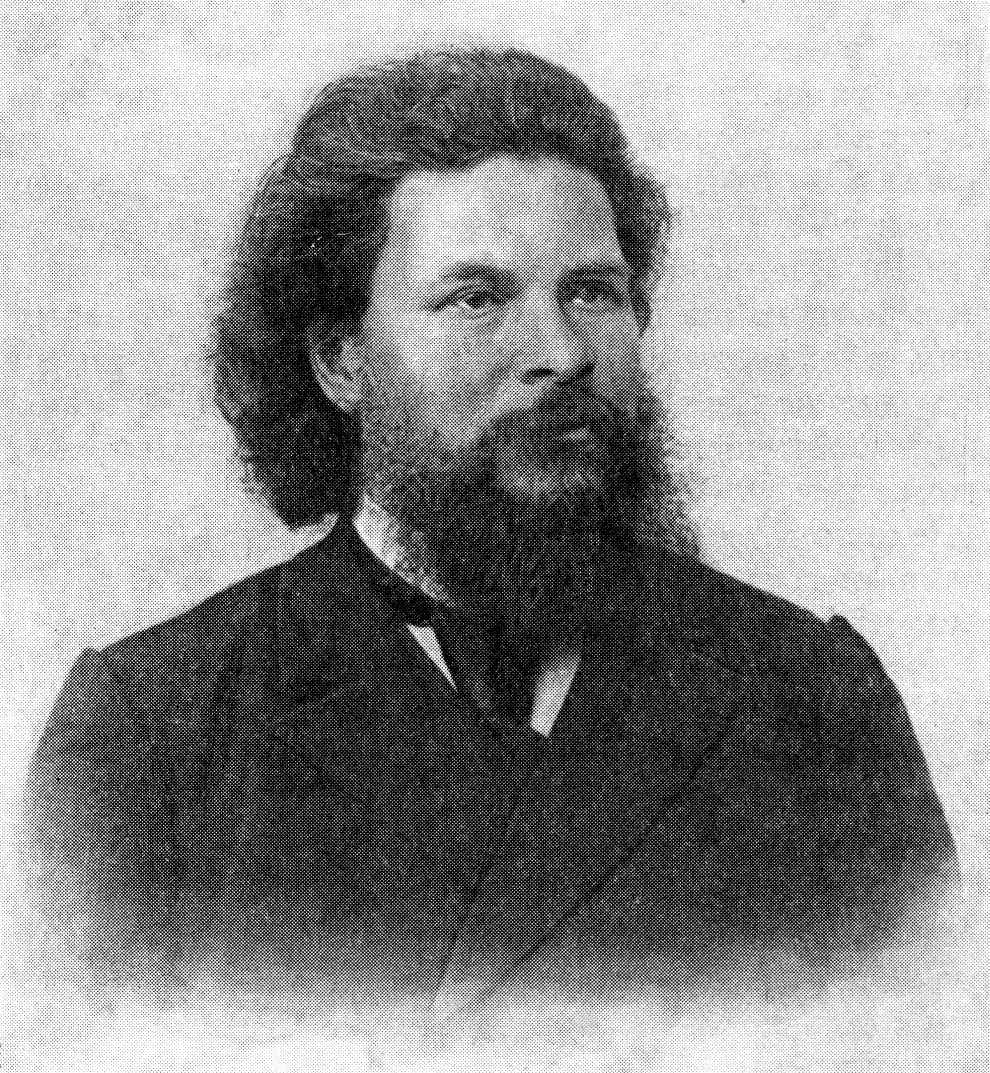 Иван Парфеньевич Бородин — ботаник, академик Петербургской академии наук.